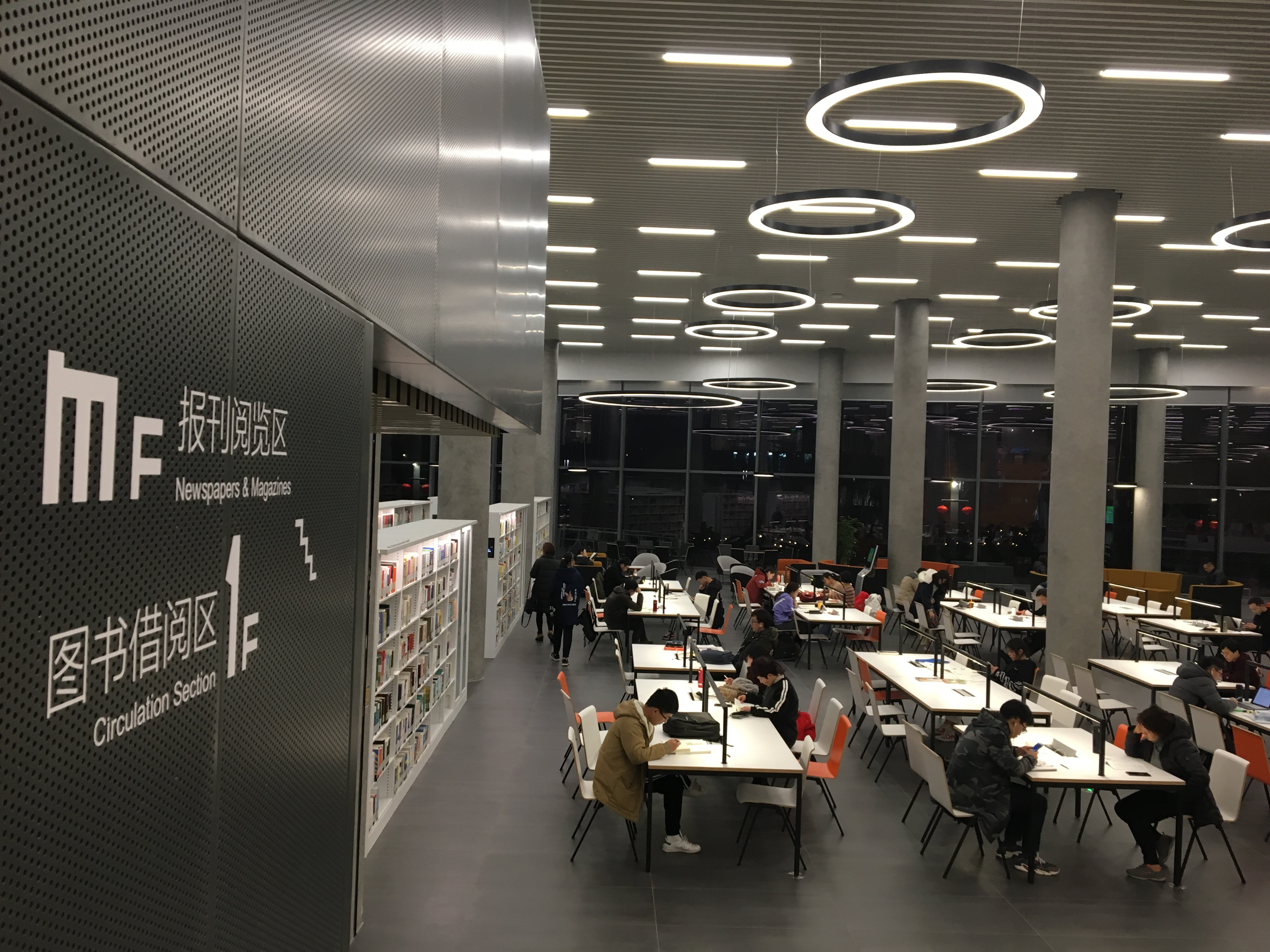 中文（中国大陆）: 宁波图书馆新馆一层阅览室